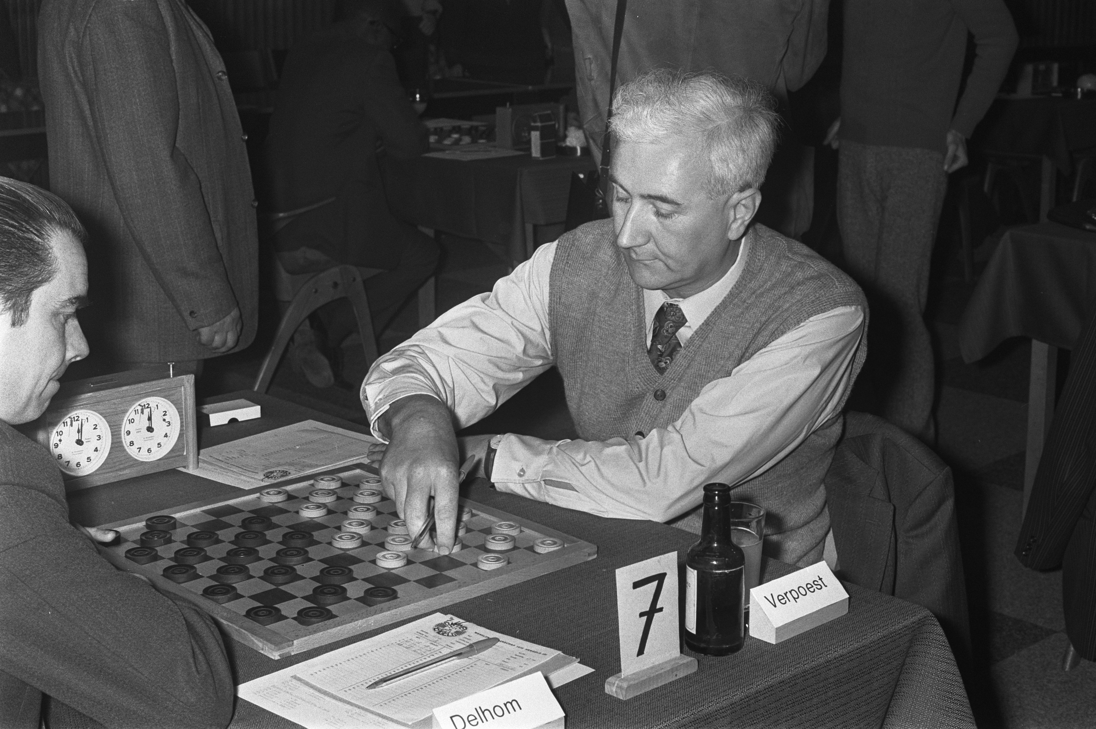 Delhom vs. Verpoest, WC 1972